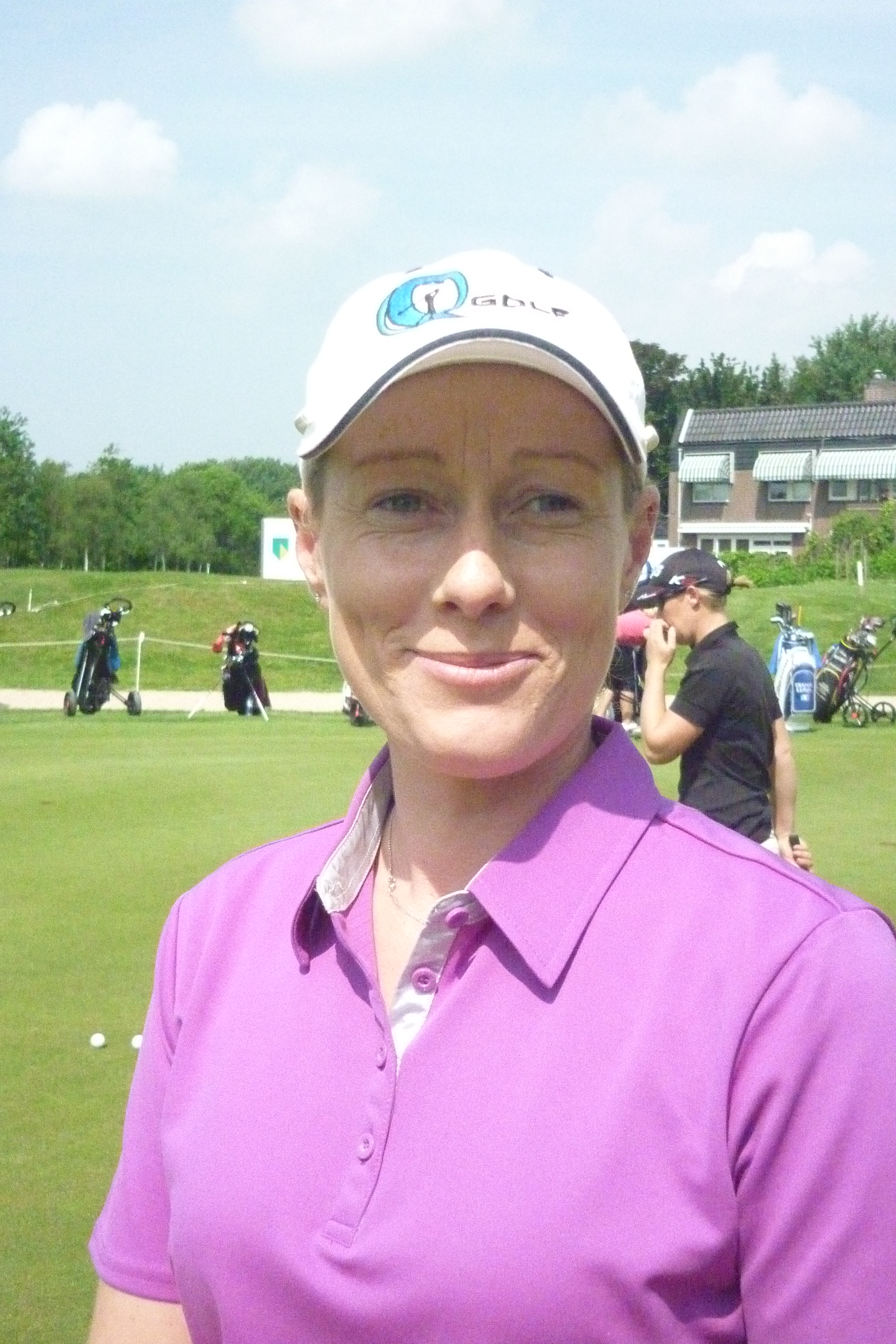 Rebecca Codd op het Dutch Ladies Open op Broekpoldder